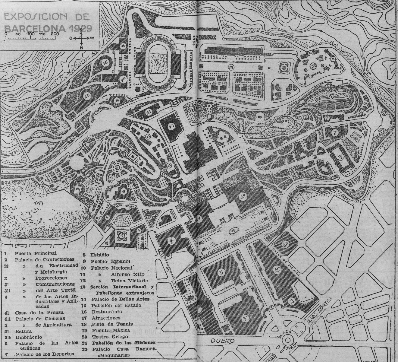 Planol de situació dels pavellons de l'Exposició Internacional de 1929 a Barcelona. Font: Diari Oficial de l'Exposició